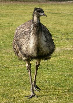 Großer Emu (Dromaius novaehollandiae) - nach Rücksprache mit User:Tannin ein ausgewachsenes Tier